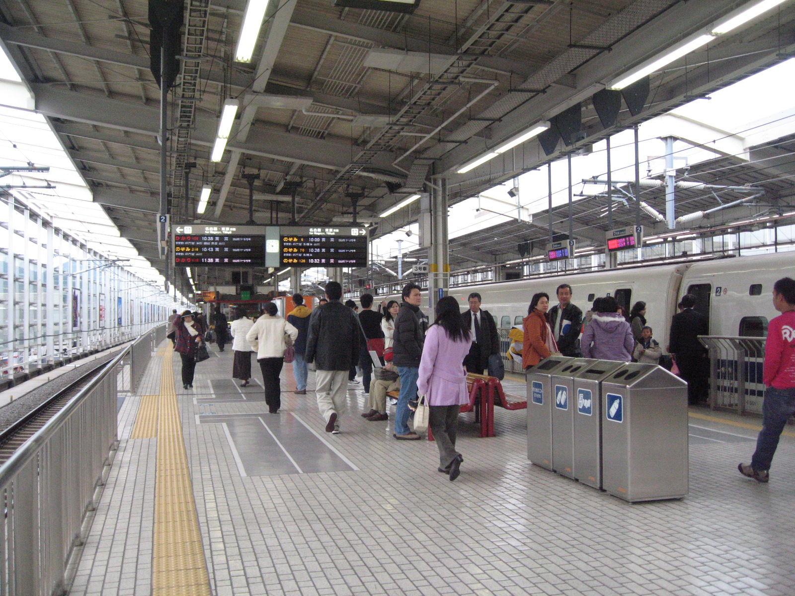 Kyoto Station, Kyoto, Kansai Region.